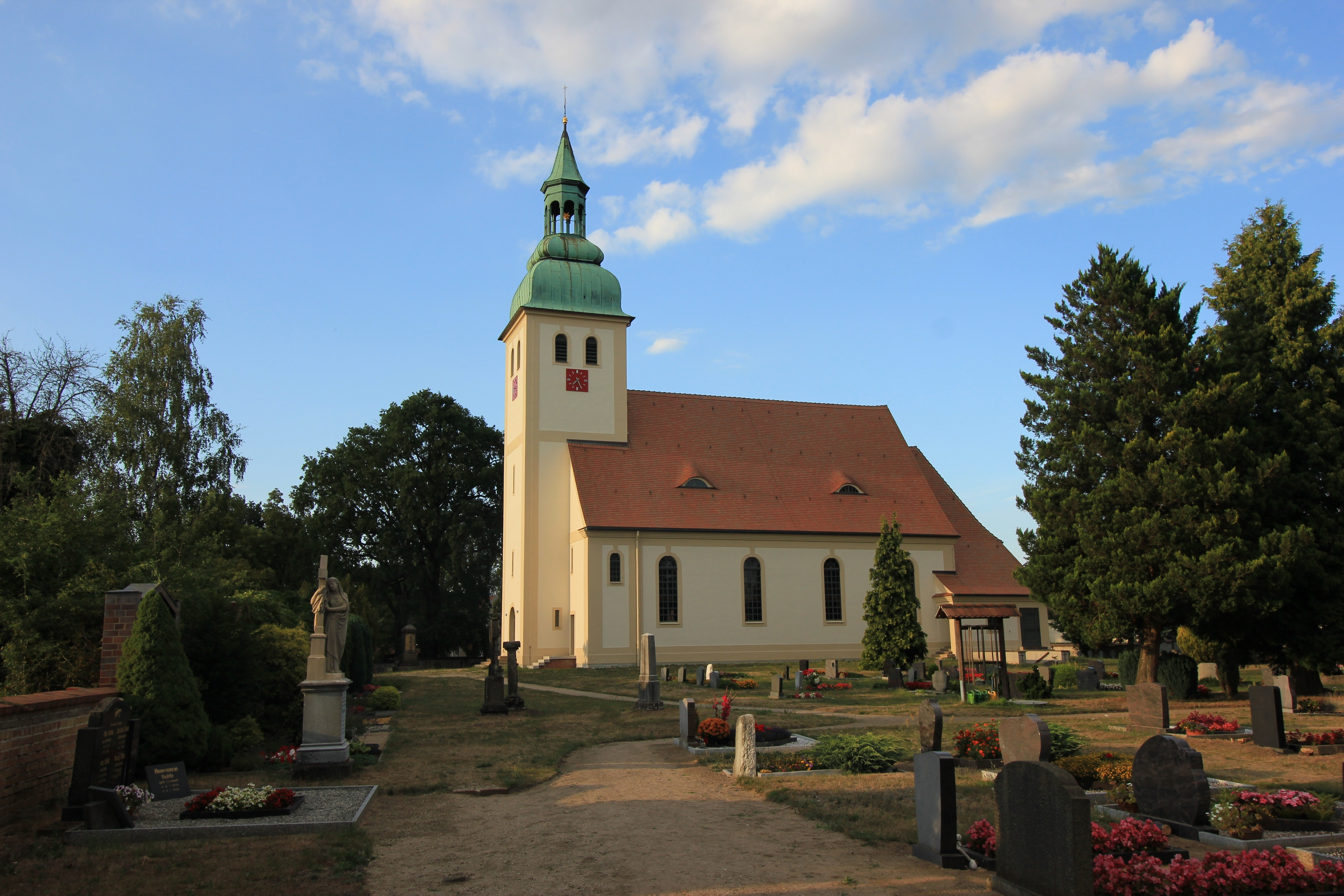 Hornjoserbsce: Ewangelska cyrkej w Dubcu, gmejna Rěčicy.